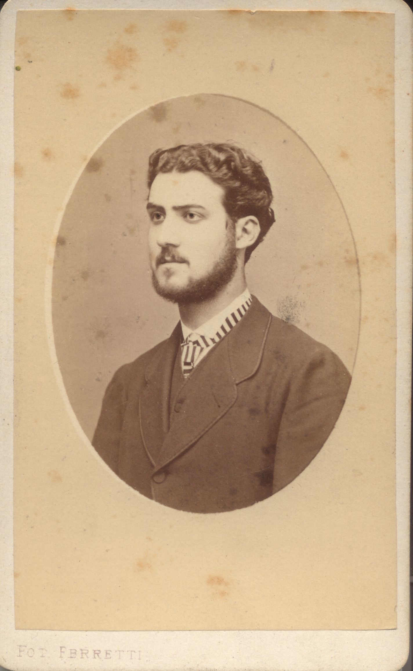 Ritratto di Pio Fabri